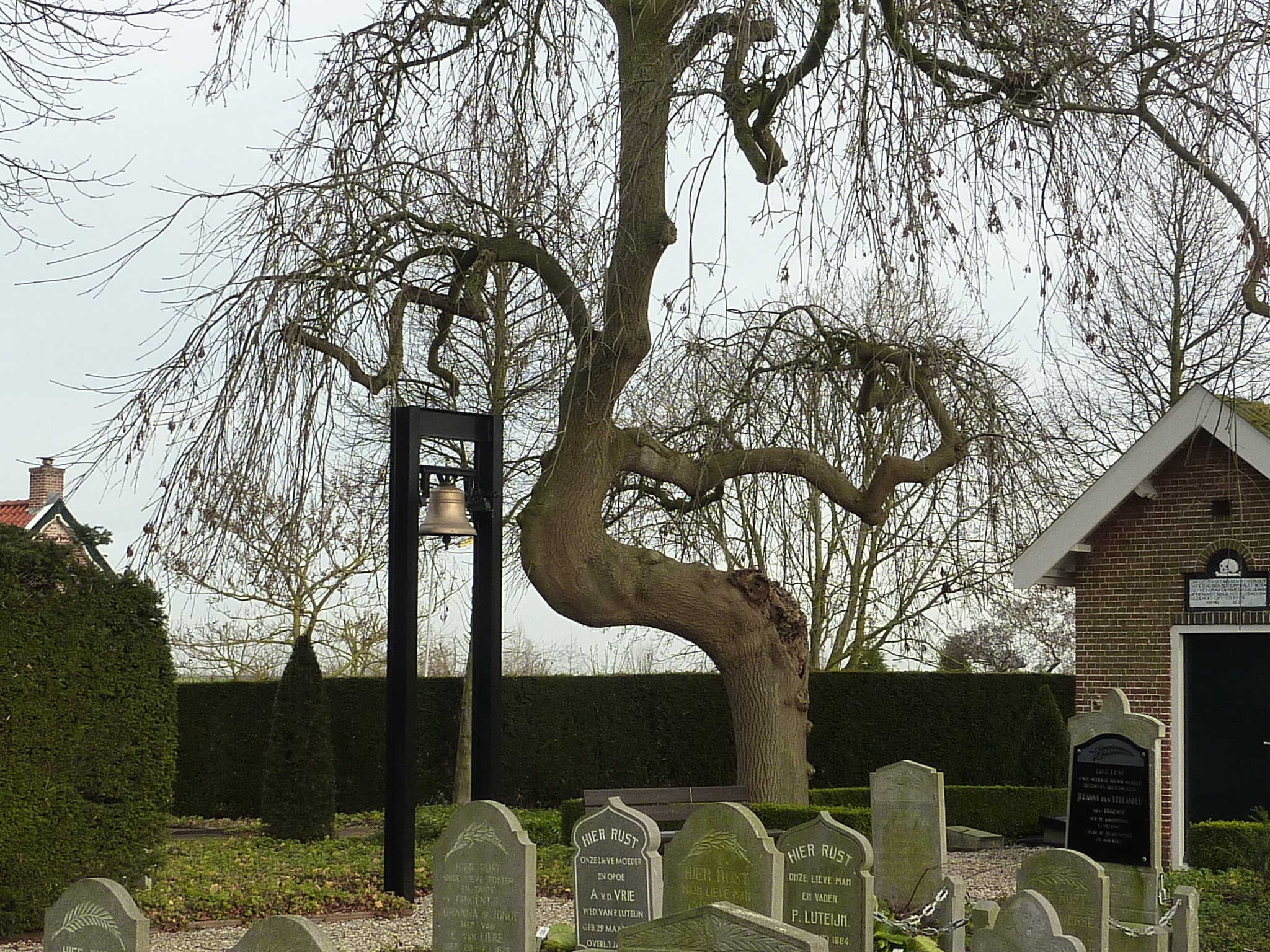 Sinoutskerke kerkhof